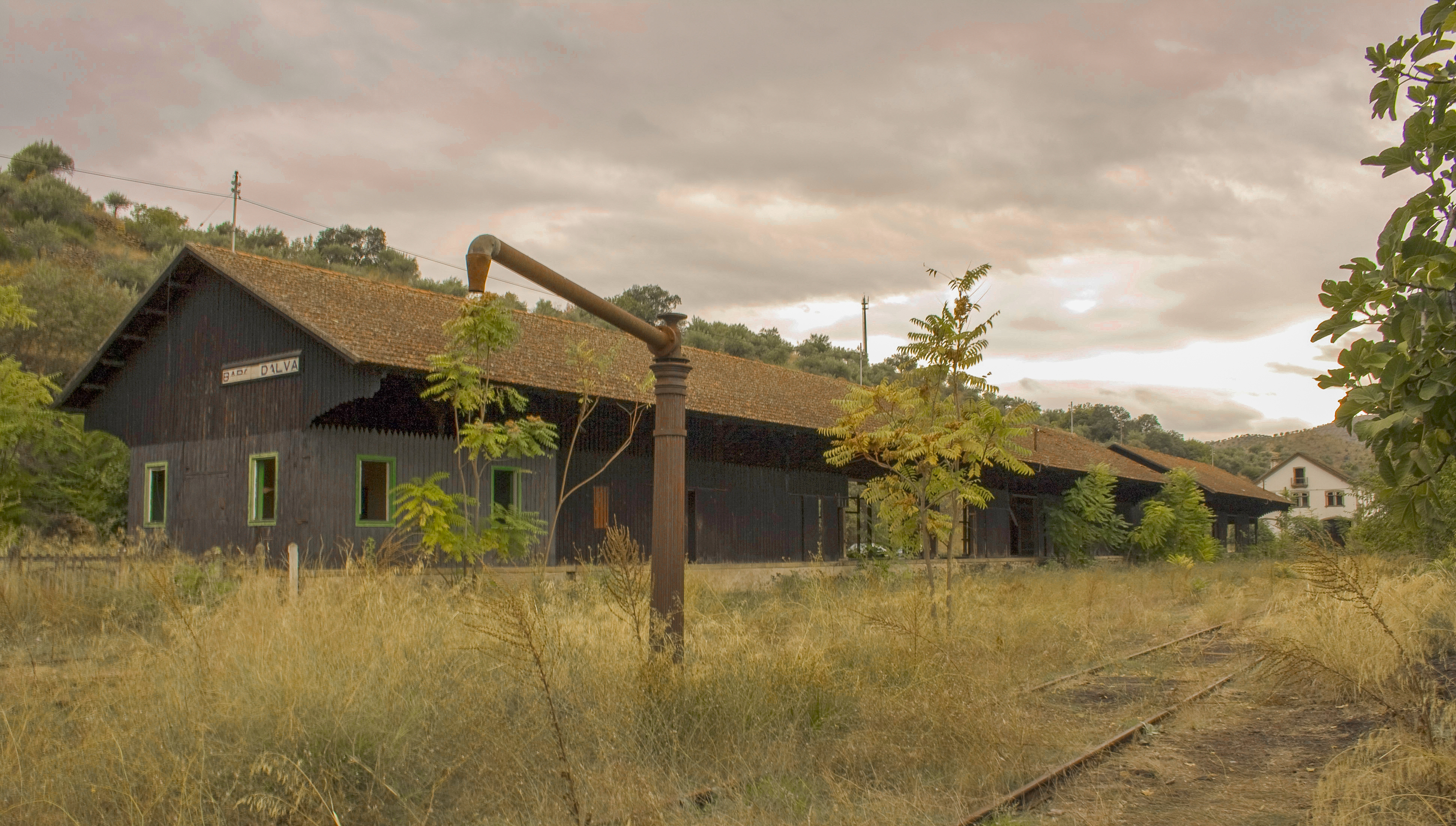 Estación internacional España-Portugal